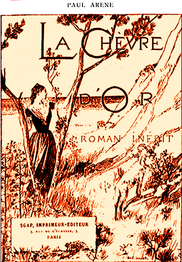 Couverture du livre de Paul Arène